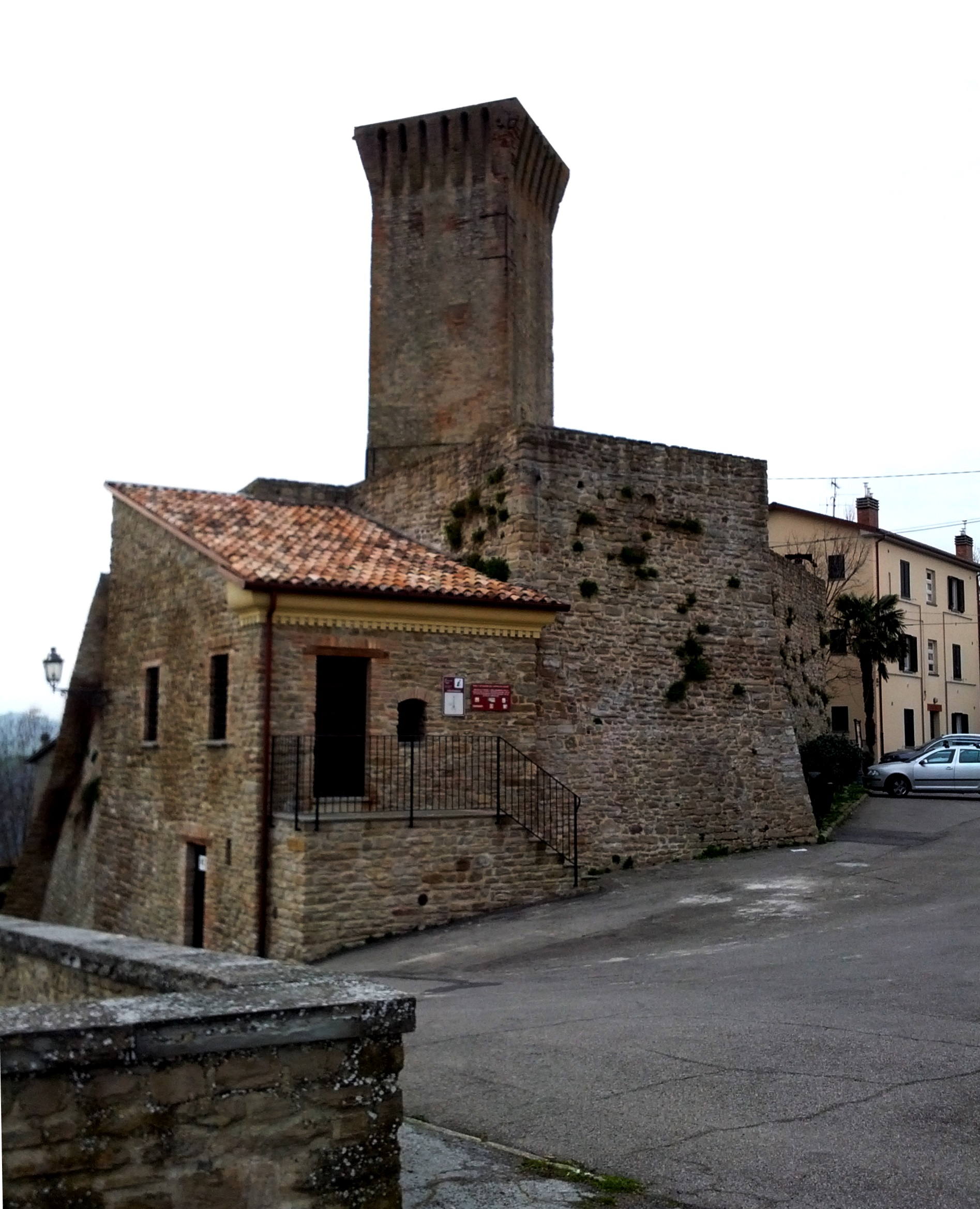 Castello di Teodorano. Meldola, Forlì-Cesena, Italia.